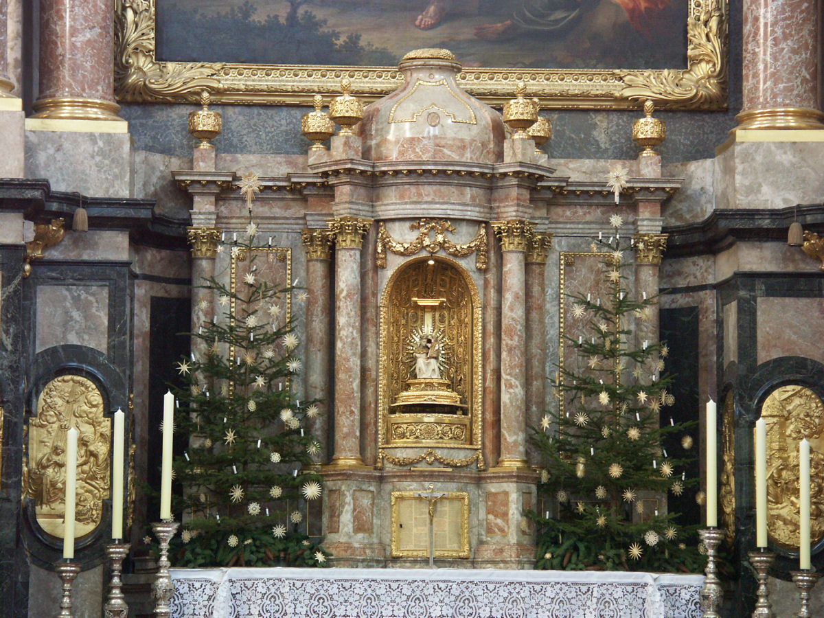 Ettal Abbey, Ettal, Germany